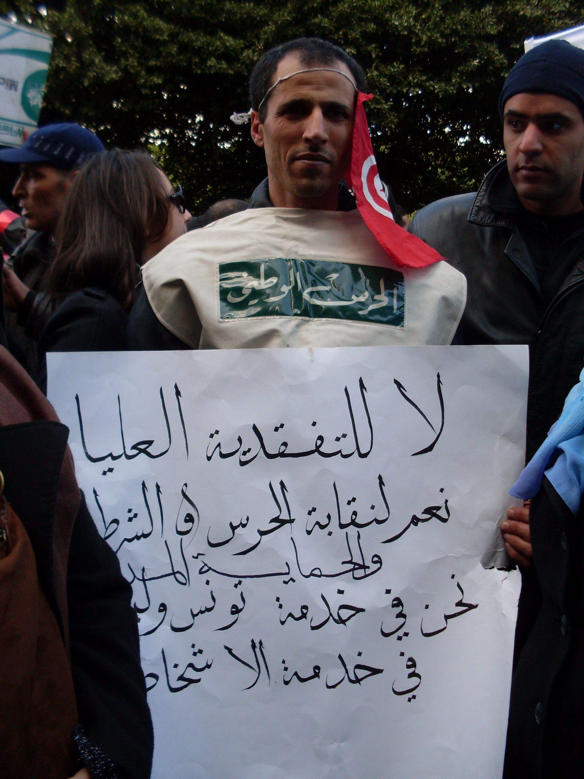 Manif des agents du ministère de l'intérieur lors de la révolution des Jasmins